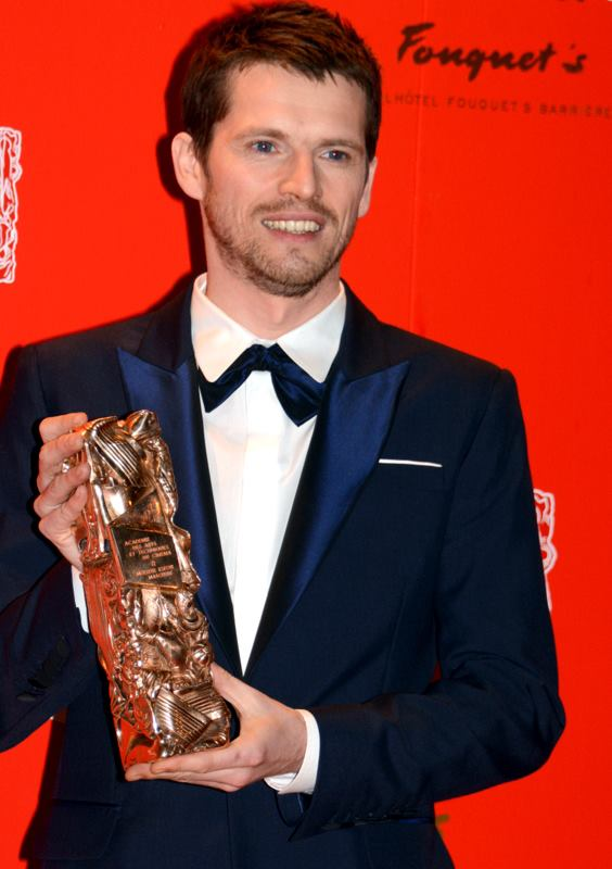 Pierre Deladonchamps à la cérémonie des César